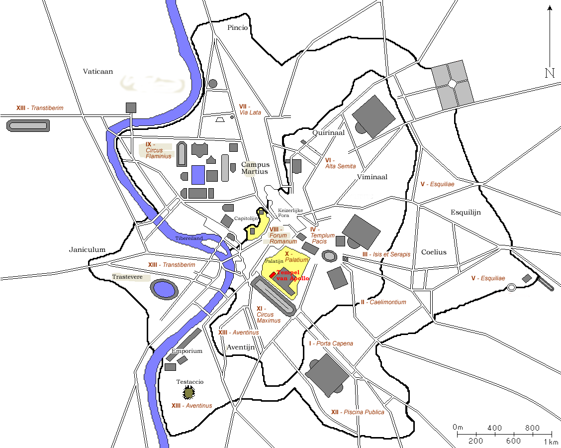 Kaart van antiek Rome waarop de Tempel van Apollo Palatinus is uitgelicht. Kaart is afkomstig van FR:wiki en door mij naar een Nederlandse versie bewerkt. Auteurs: nl::fr:User:ColdEel en Gebruiker:Joris1919